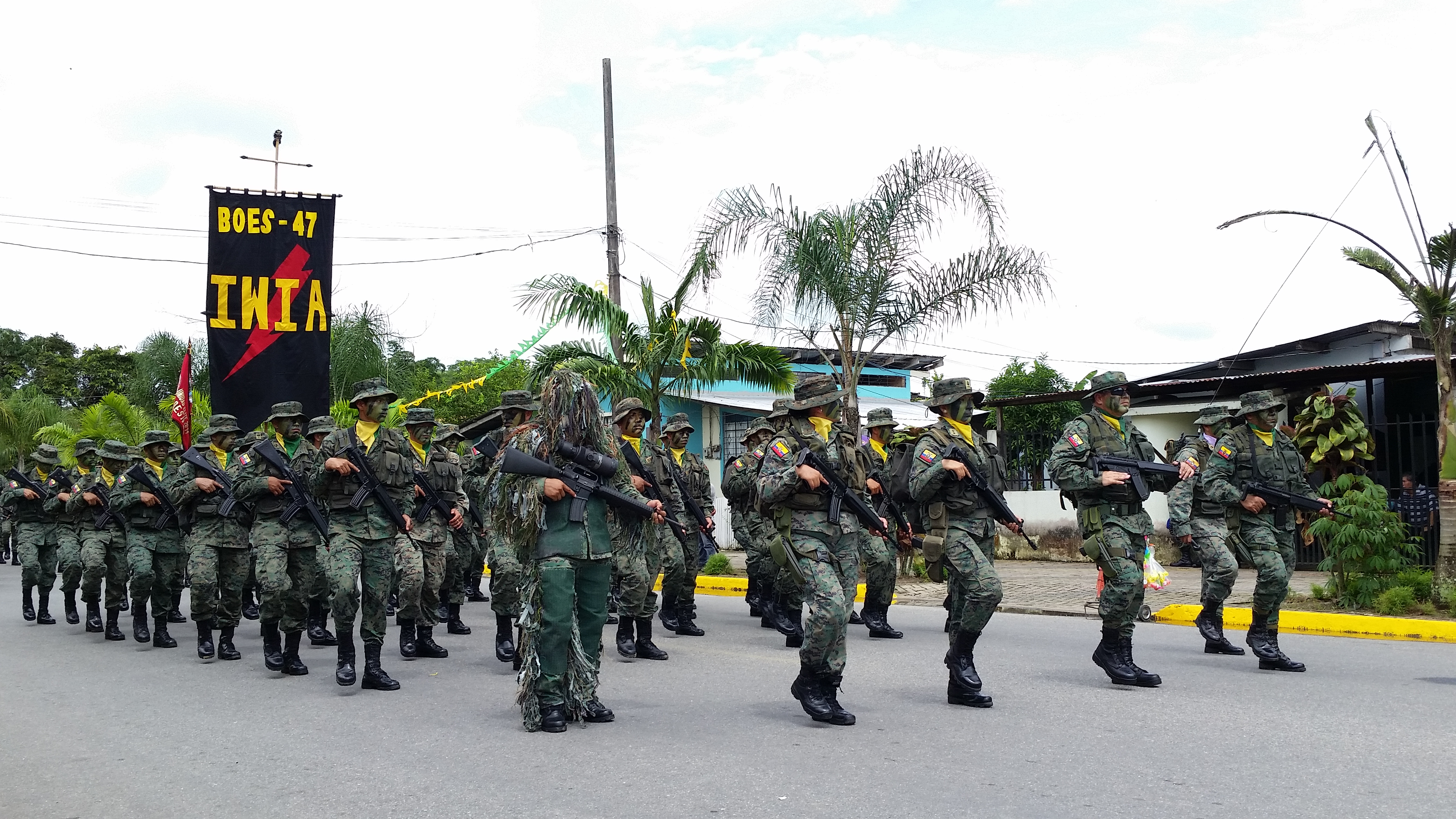 Soldados del Grupo Comandos de Selva Iwias desfilando en Tena